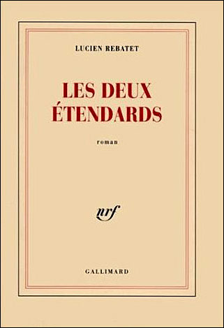 Couverture LES DEUX ÉTENDARDS de Lucien Rebatet